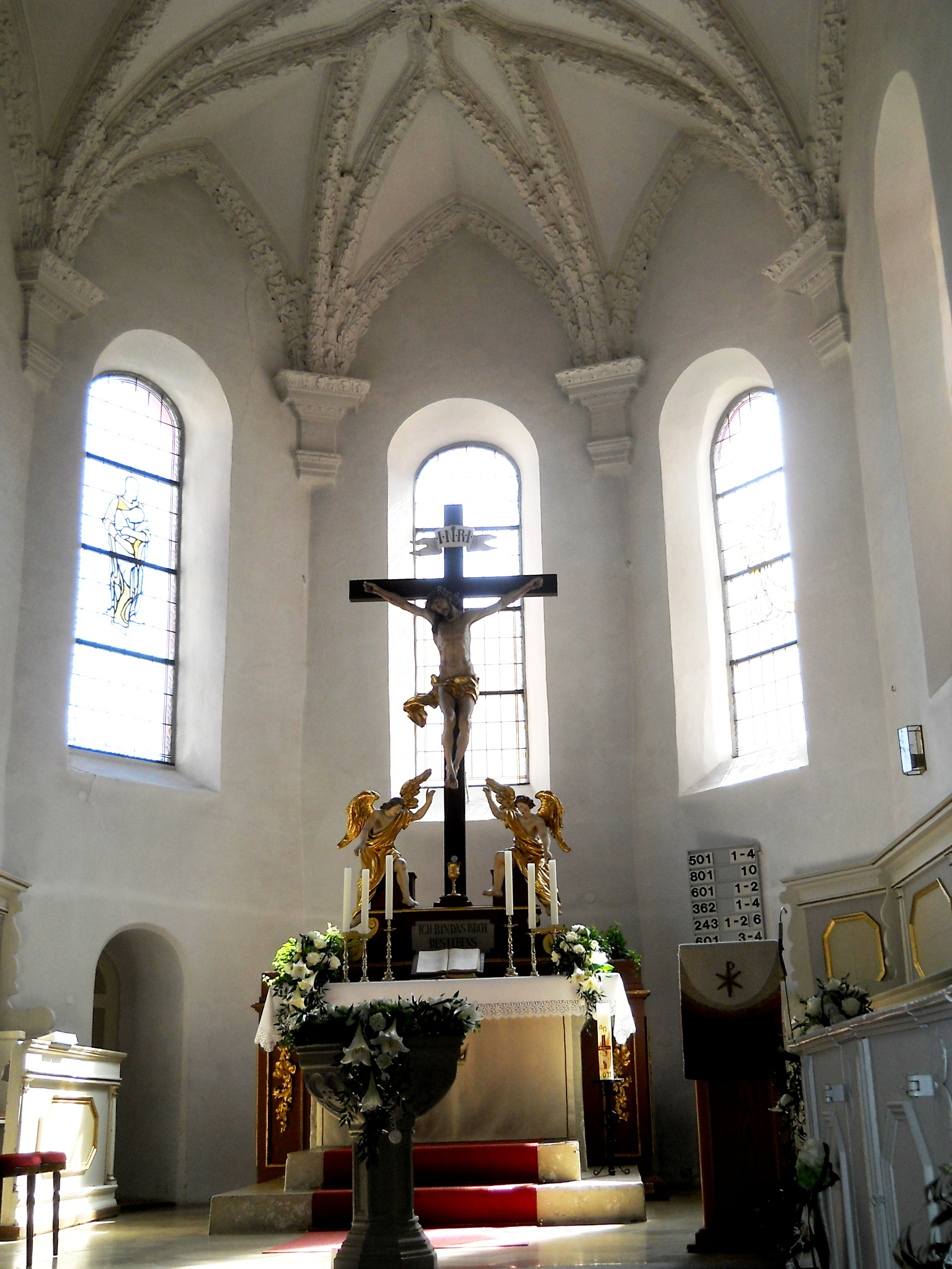 Laubenzedel, Ortsteil von Gunzenhausen im Landkreis Weißenburg-Gunzenhausen (Bayern), Evang.-luth. Pfarrkirche St. Sixtus, Altar mit Volpini-Kreuz